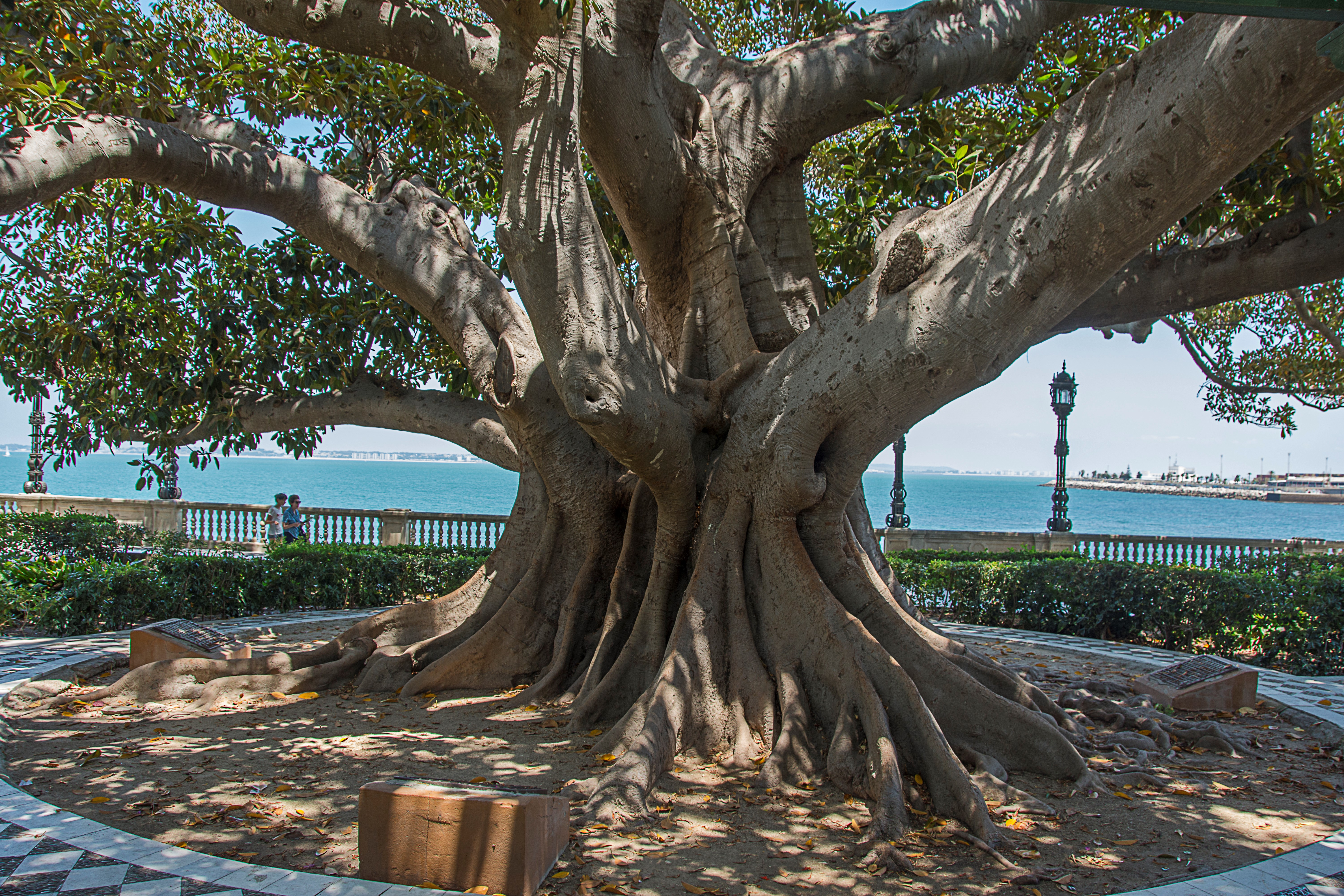 Vista de uno de los ficus de la Alameda Apodaca en Cádiz.